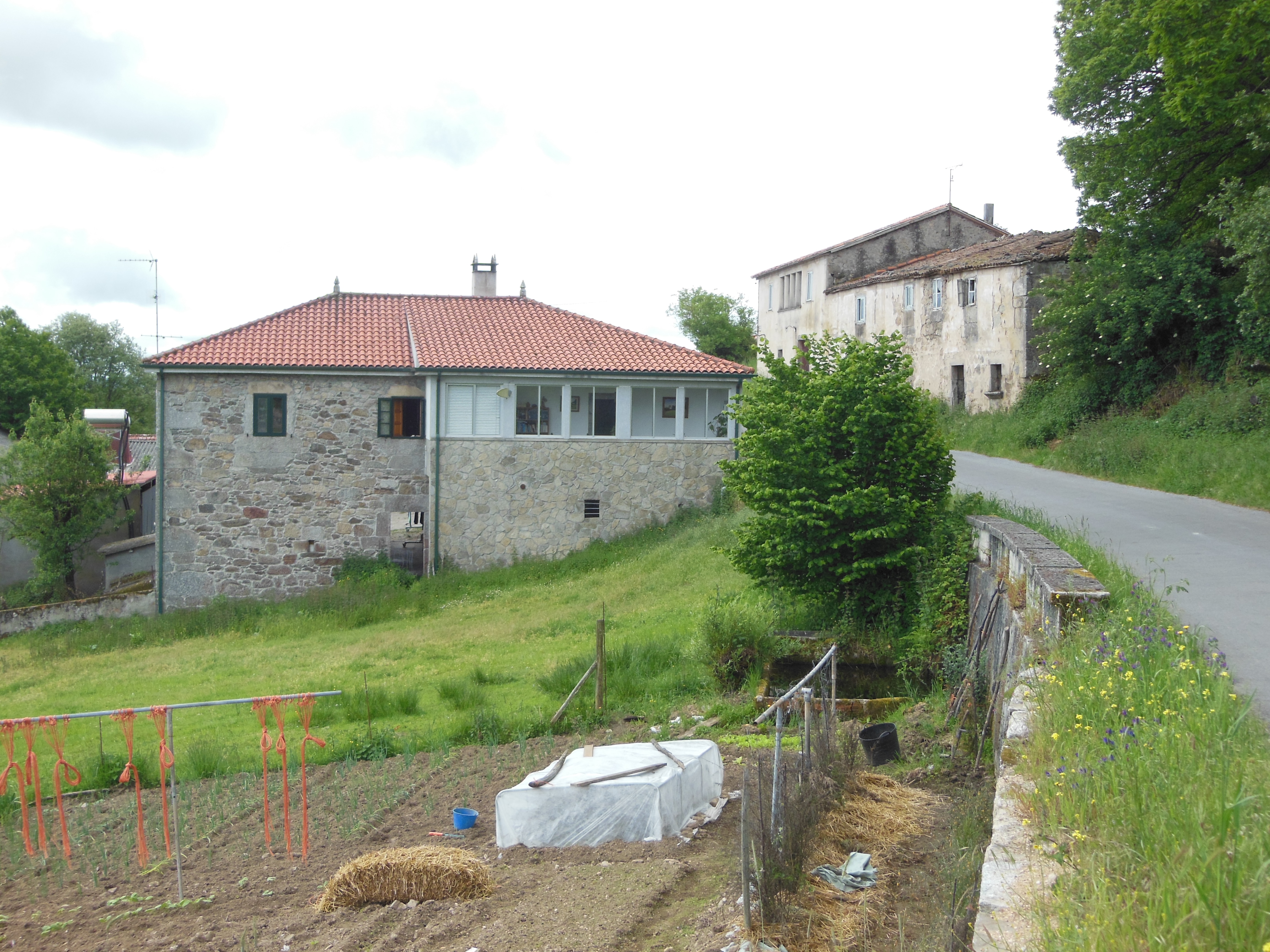 Vista de Cal de Mourelle (Ansar, Taboada)